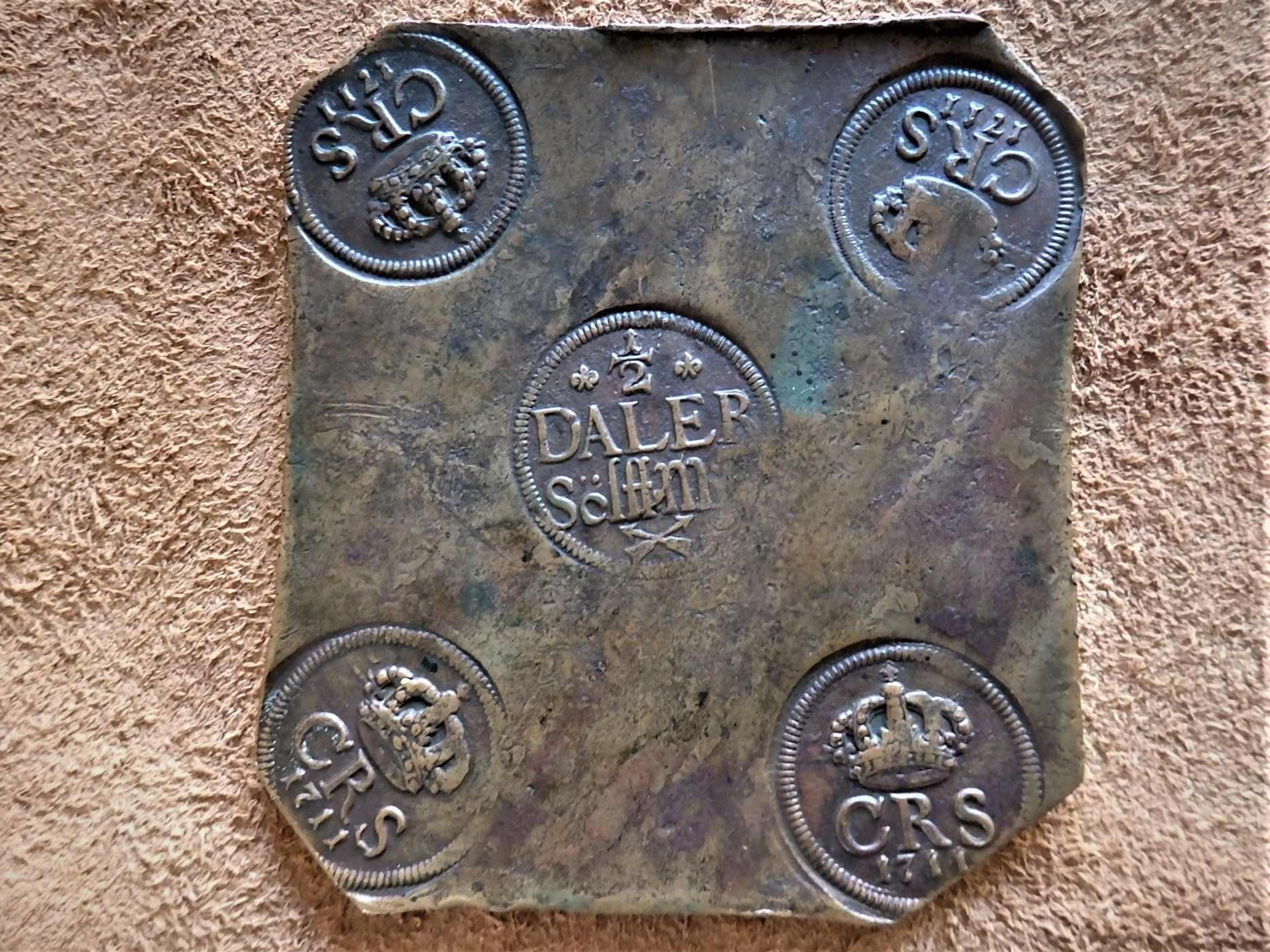 1/2 Daler von 1711, schwedisches Kupferplattengeld